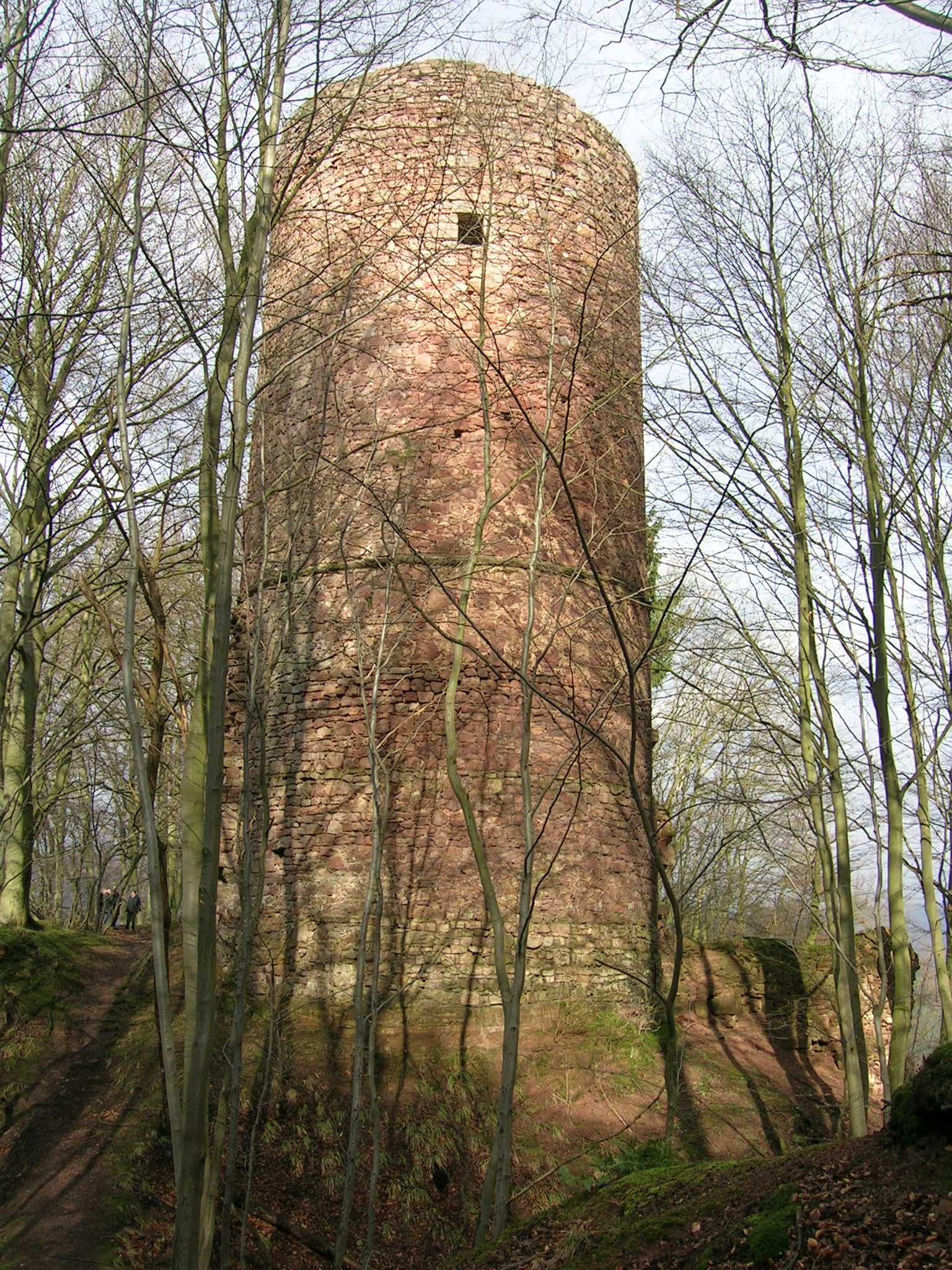 Burgfried der Bramburg bei Hemeln